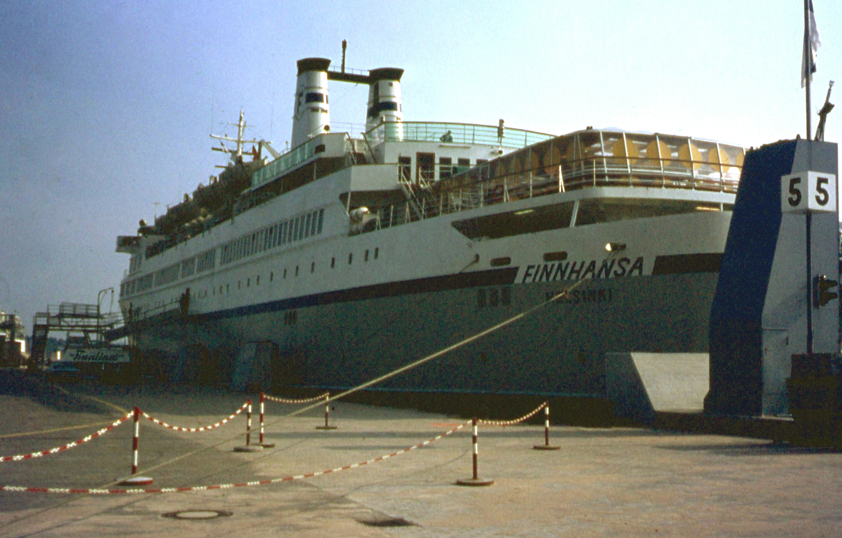 Finnhansa in Travemünde in juni 1972